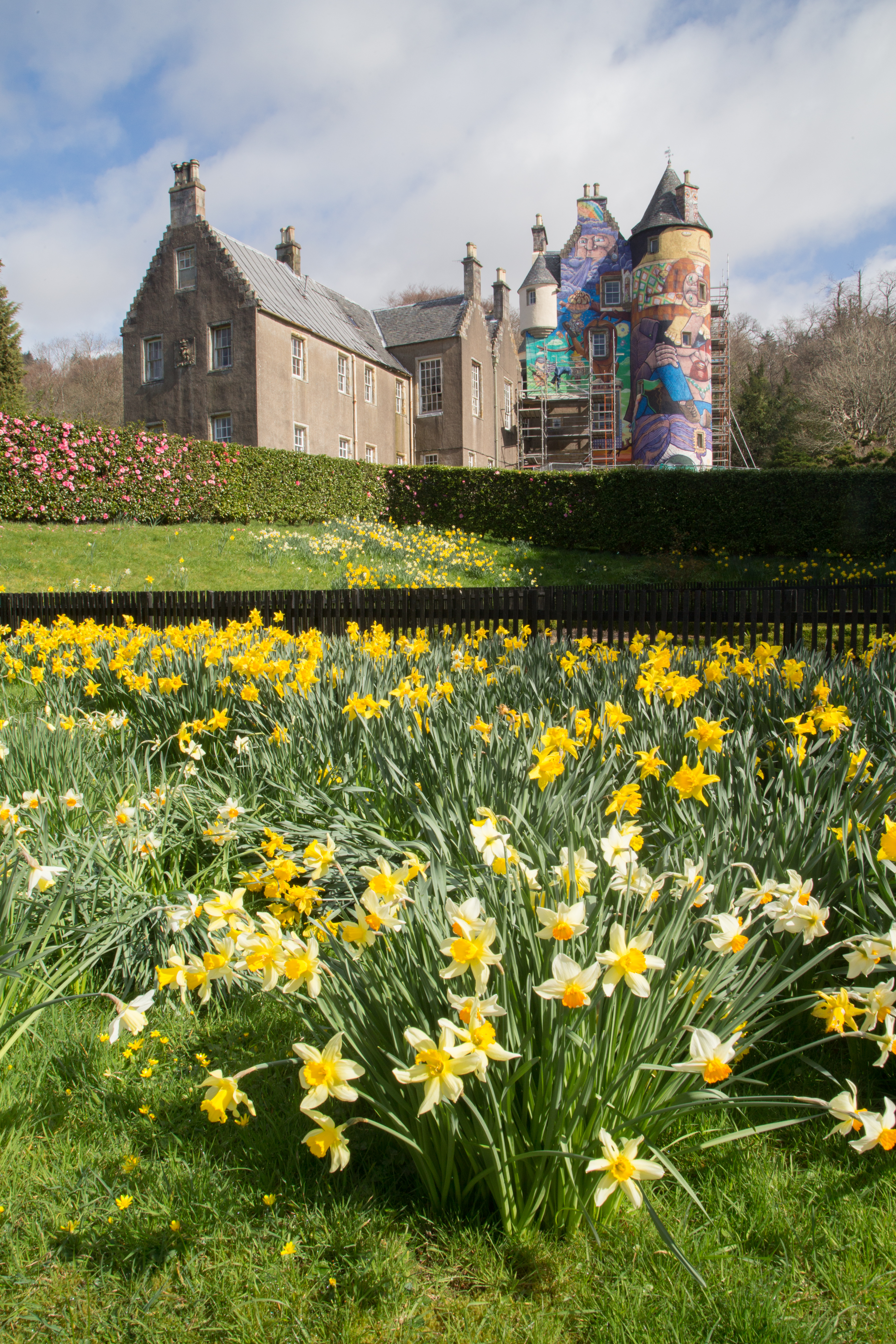 Kelburn Castle